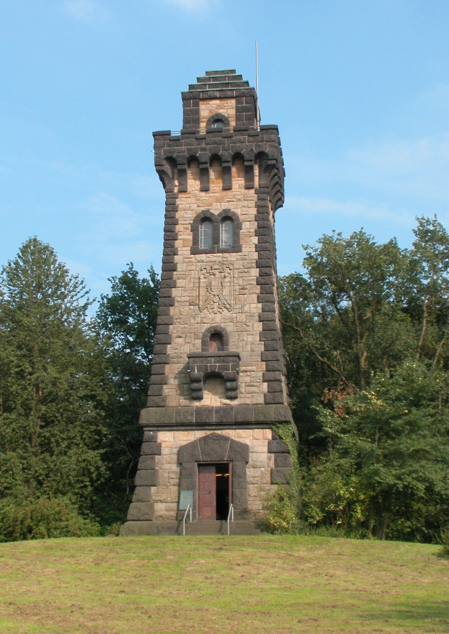 Bismarckturm